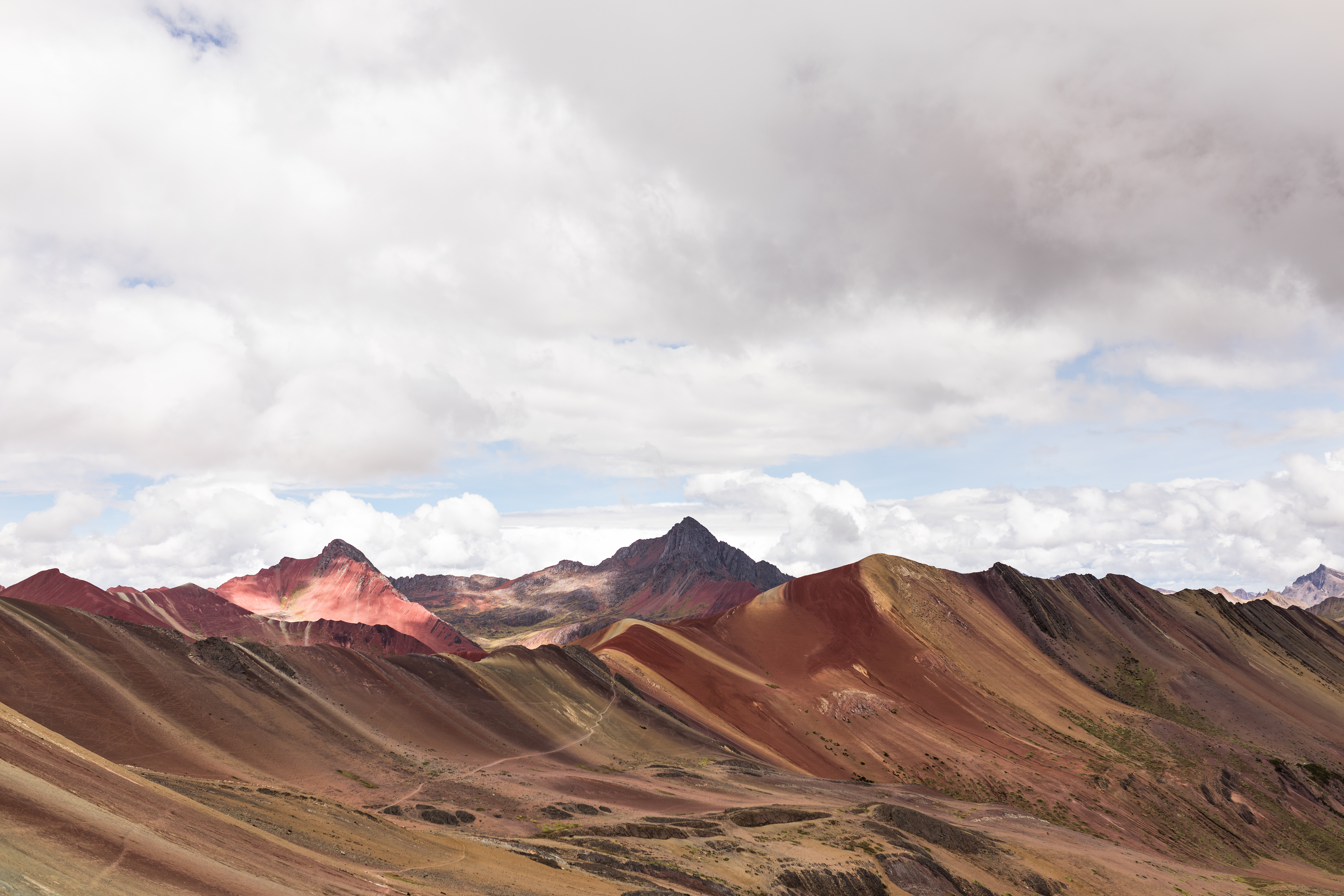 Montaña Arcoiris. Vinicunca. Winicunca.